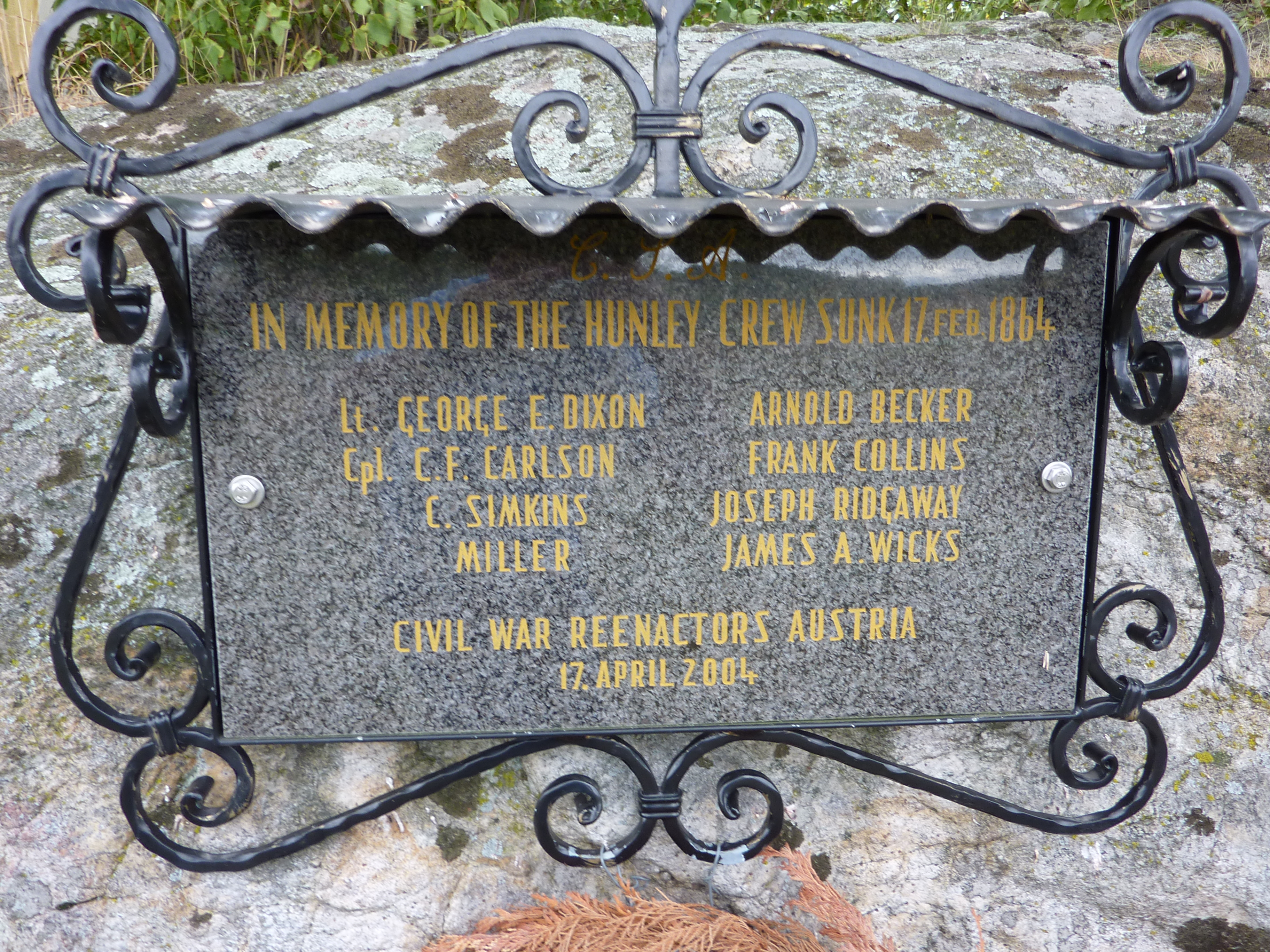 Buchberger Waldhütten, Schönberg am Kamp, Niederösterreich - Gedenktafel (westlich der Ortskapelle) für die Crew der H. L. Hunley (Civil War Reenactors Austria, 17. April 2004)